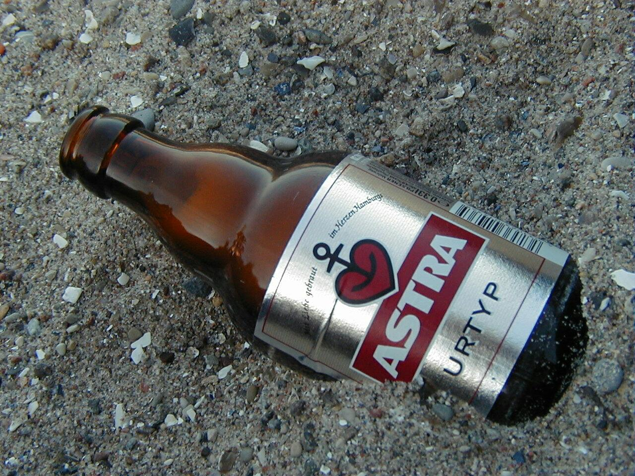 Bildbeschreibung: Fotografie einer 0,33l Flasche Astra Urtyp Fotograf: L. Schröder (Benutzer:kylähullu, eigenes Foto) Datum: 11. 7. 2006